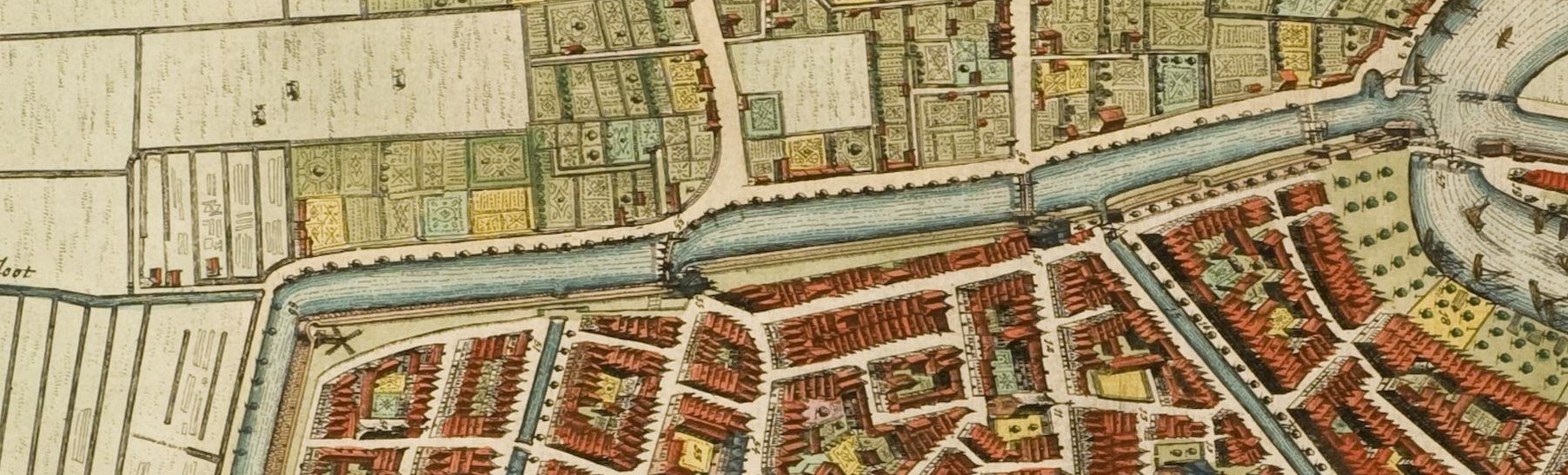 Uitsnede van de kaart van Haarlem van Pieter Wils 1646, noordelijke gracht, Kruispoort, Janspoort